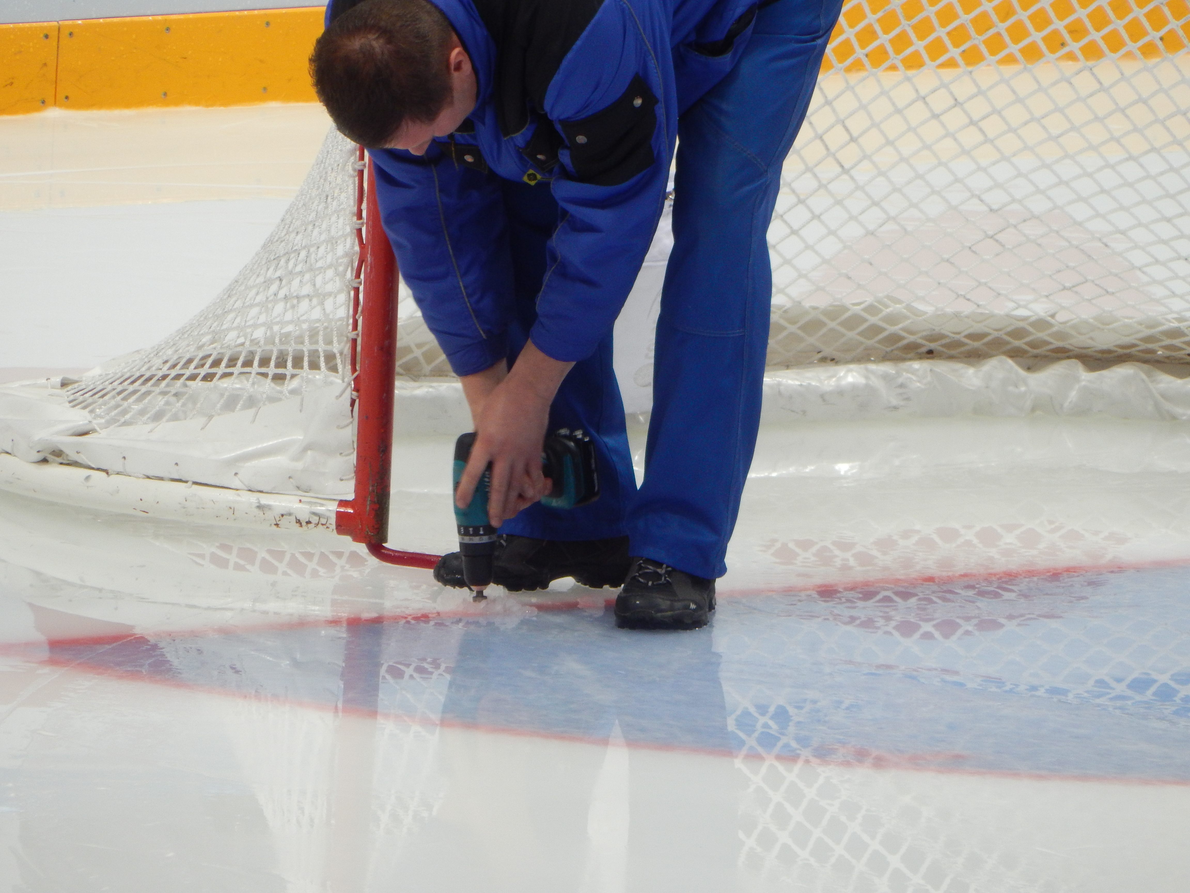 Установка ворот на Кубке Первого Канала